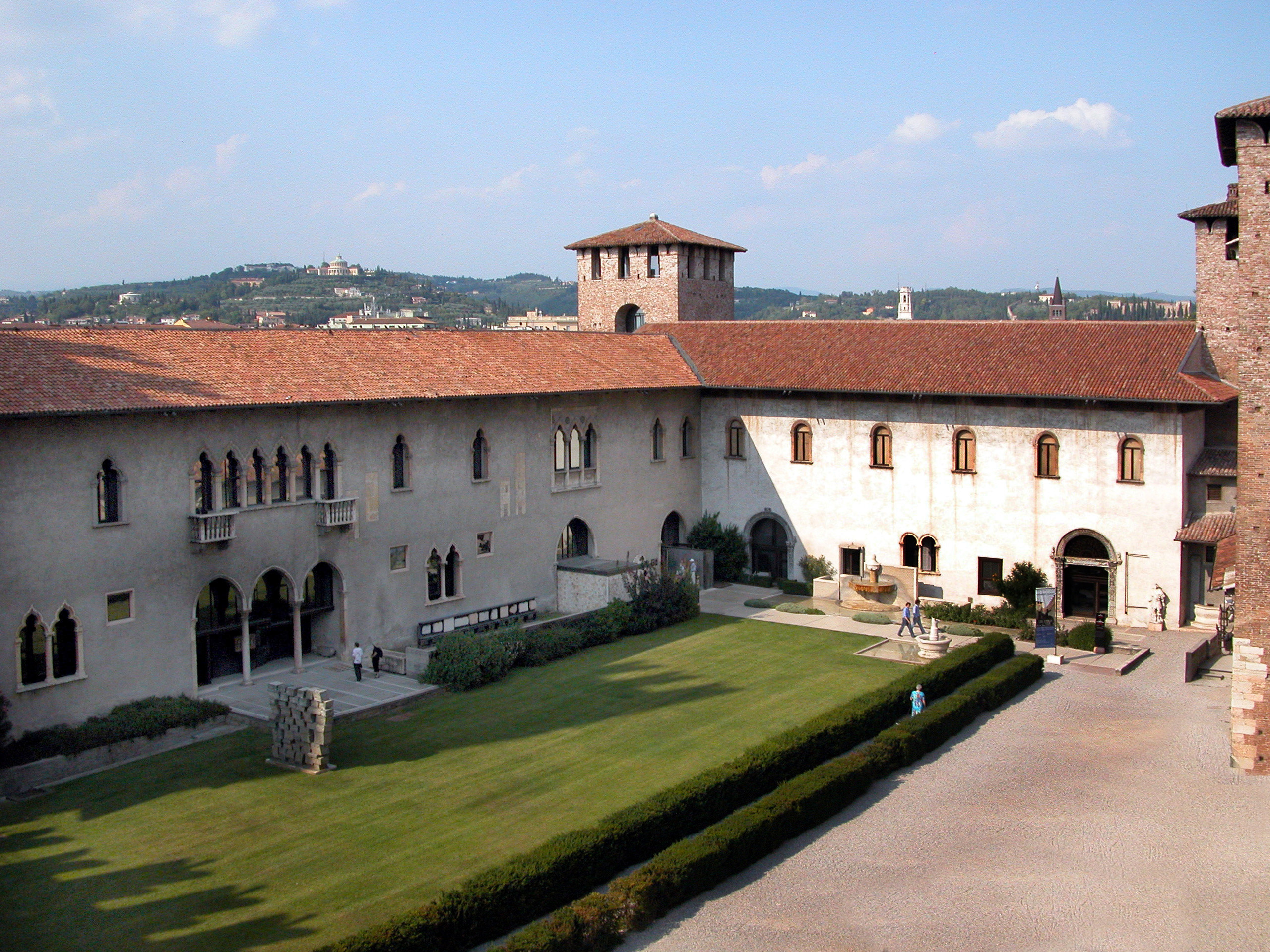 Castelvecchio - cortile